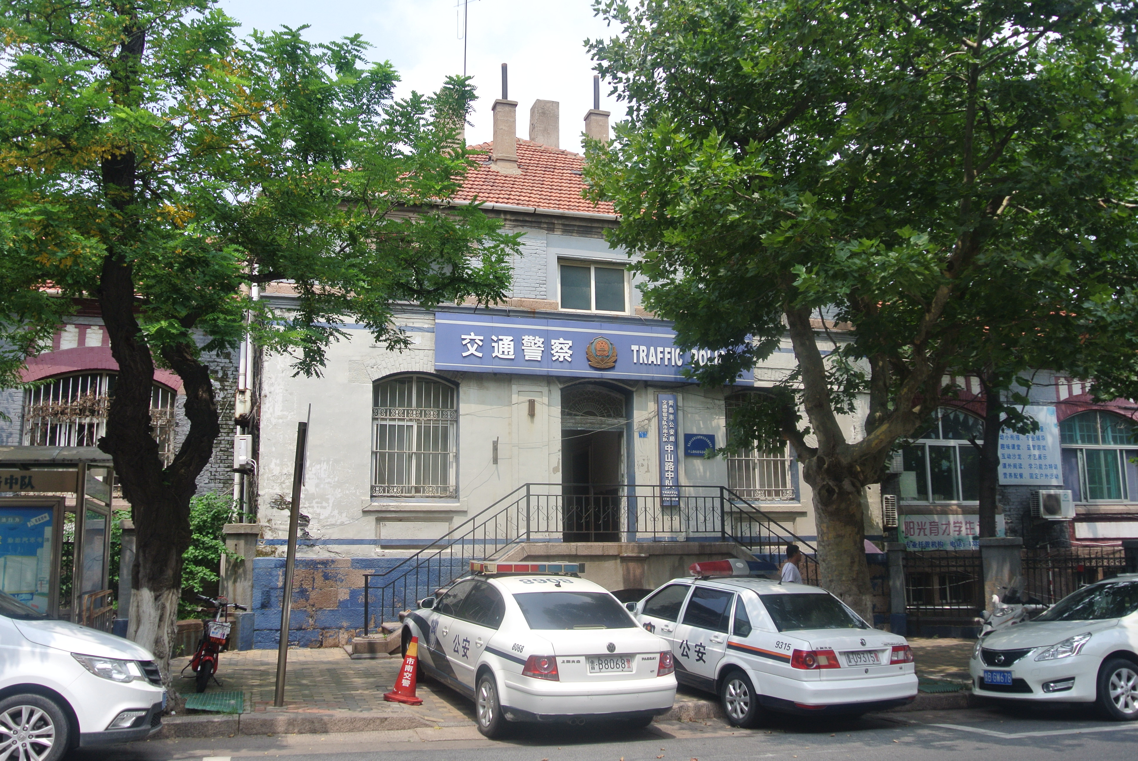 青岛圣言会附属教堂旧址